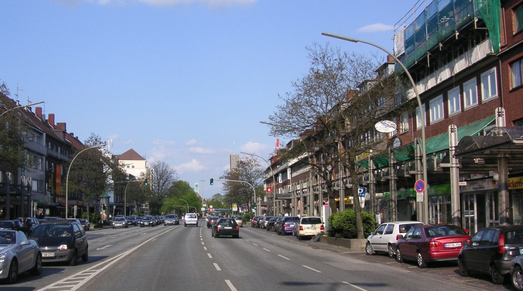 Wandsbeker Marktstraße in Hamburg